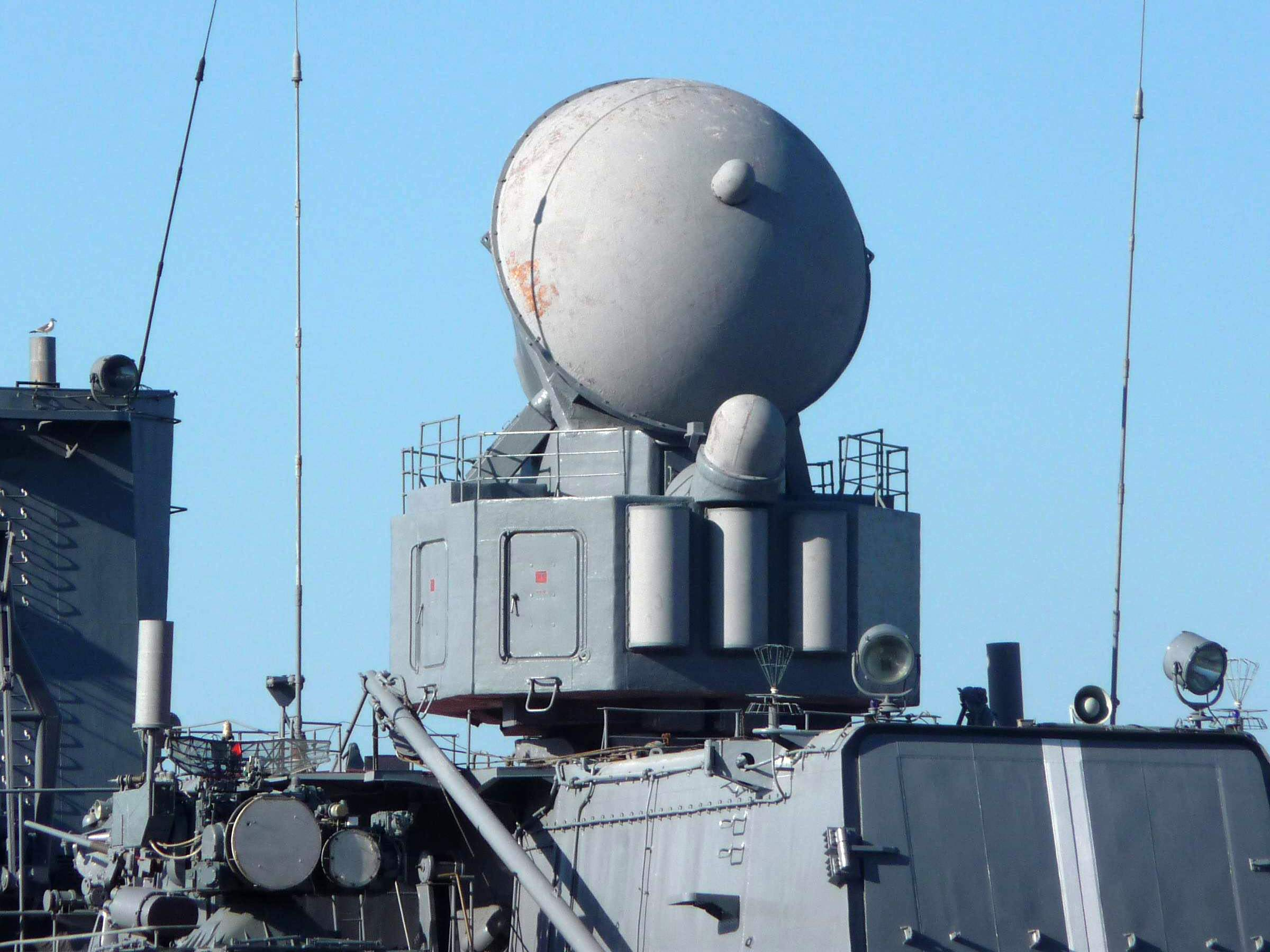 РЛС 3Р41 «Волна» на ракетном крейсере «Варяг», Владивосток, 2011-07-05